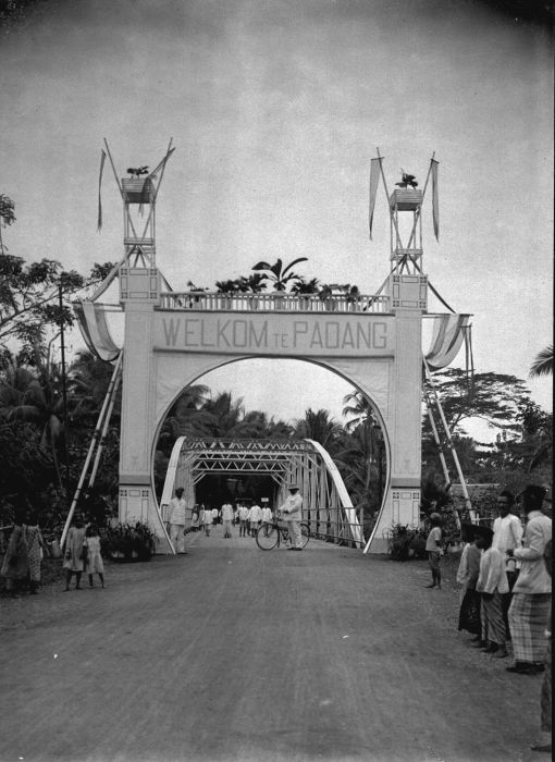 Foto. Ereboog bij een brug met opschrift 'Welkom te Padang' ter gelegenheid van het bezoek van Gouverneur-Generaal Van Limburg Stirum, Westkust -Sumatra.